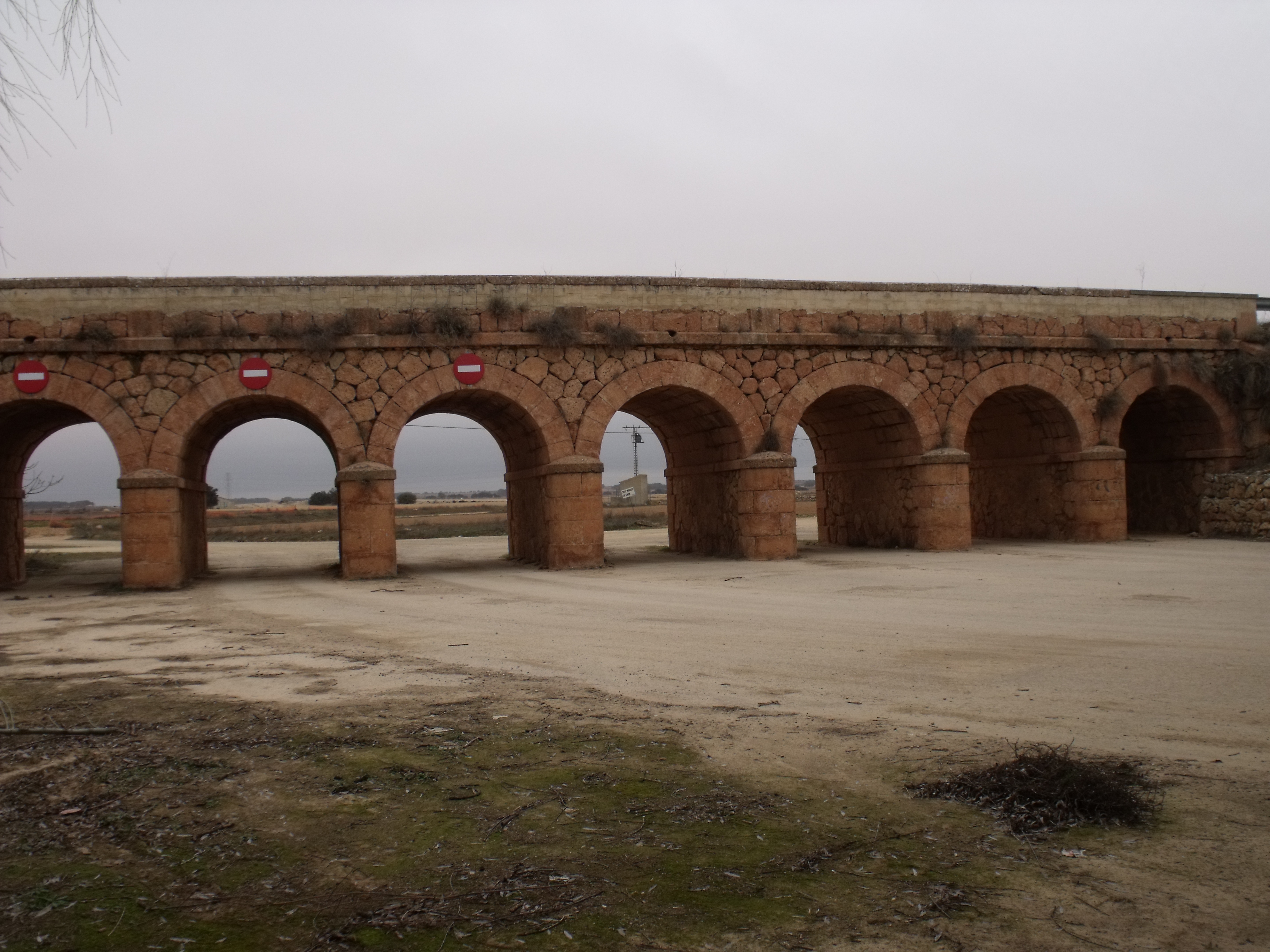 Puente, de estilo romano, pero mucho más moderno.